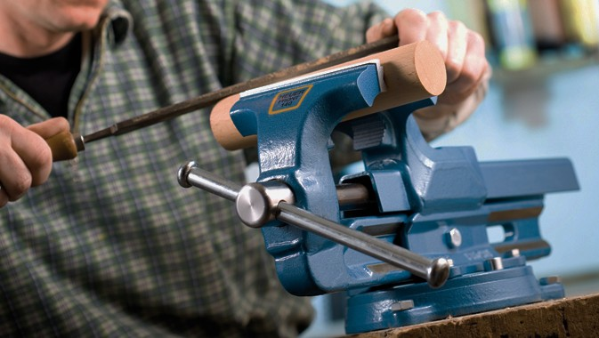 vice